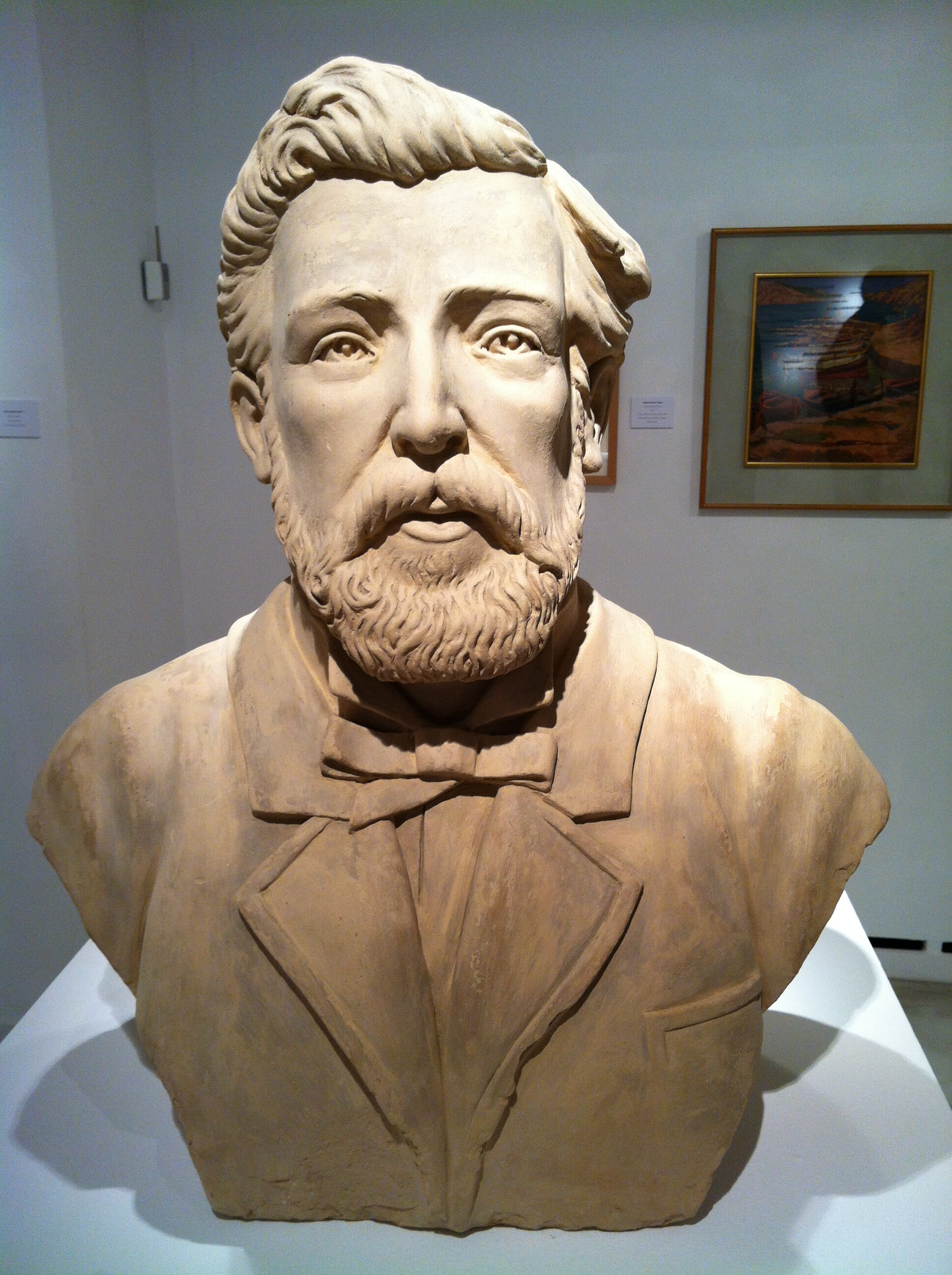 L'Exposició d'Artistes Lleidatans, també coneguda com l'exposició de 1912, fou una exposició col·lectiva d'artistes originaris de la província de Lleida celebrada als salons de la Paeria entre l'11 de maig i el 9 de juny de 1912. La mostra aplegà 29 artistes diferents, que presentaren un total de 219 peces. La fundació del Museu d'Art Jaume Morera pot entendre's com una conseqüència directa d'aquest esdeveniment. El 2012 el Museu Jaume morera en va fer una reedició de l'exposició.